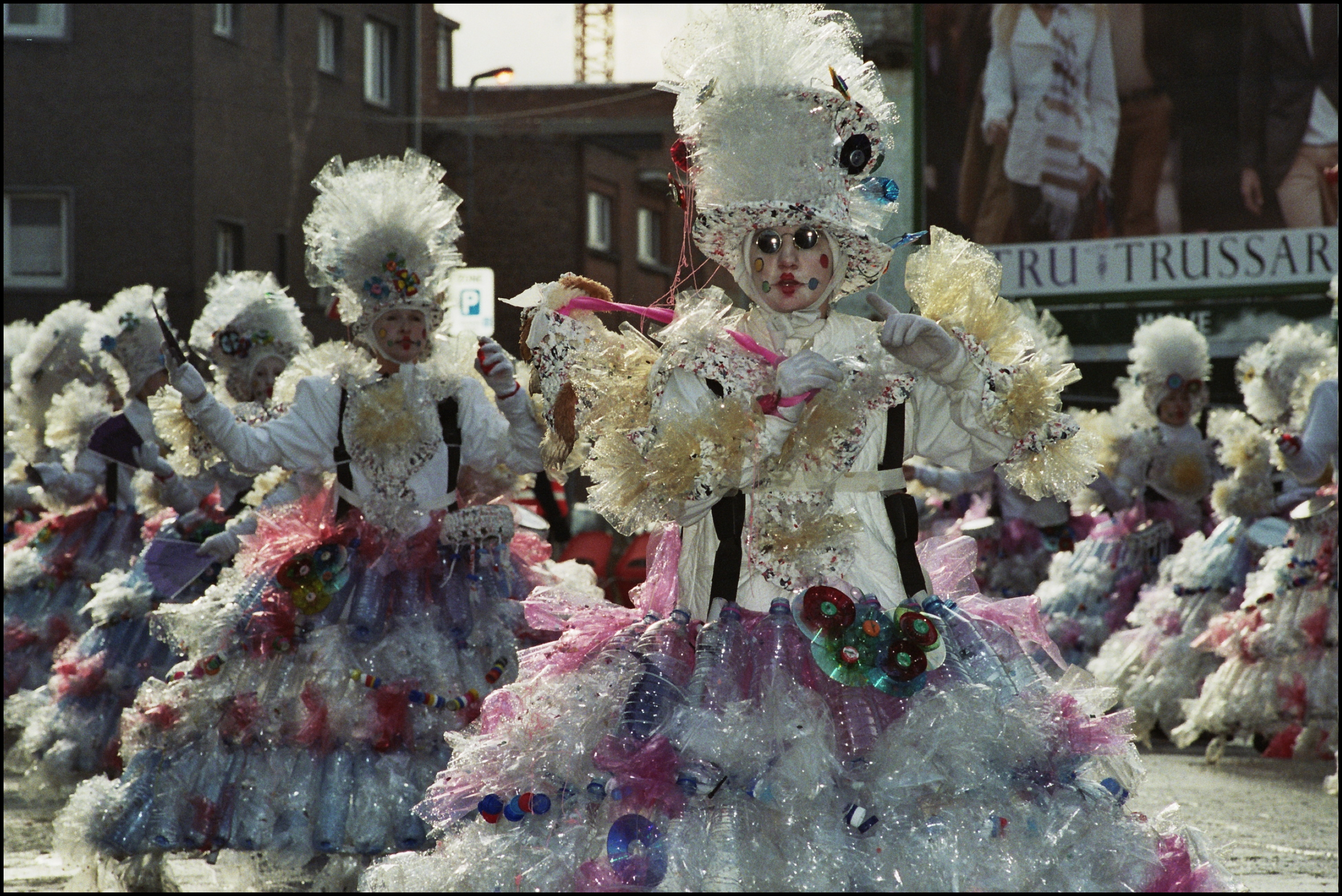 Aalst Carnaval Stoet